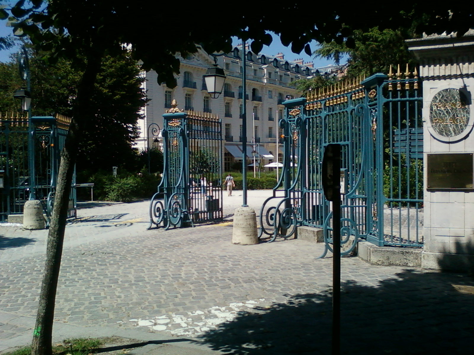 Entrée de l'Hôtel Trianon Palace